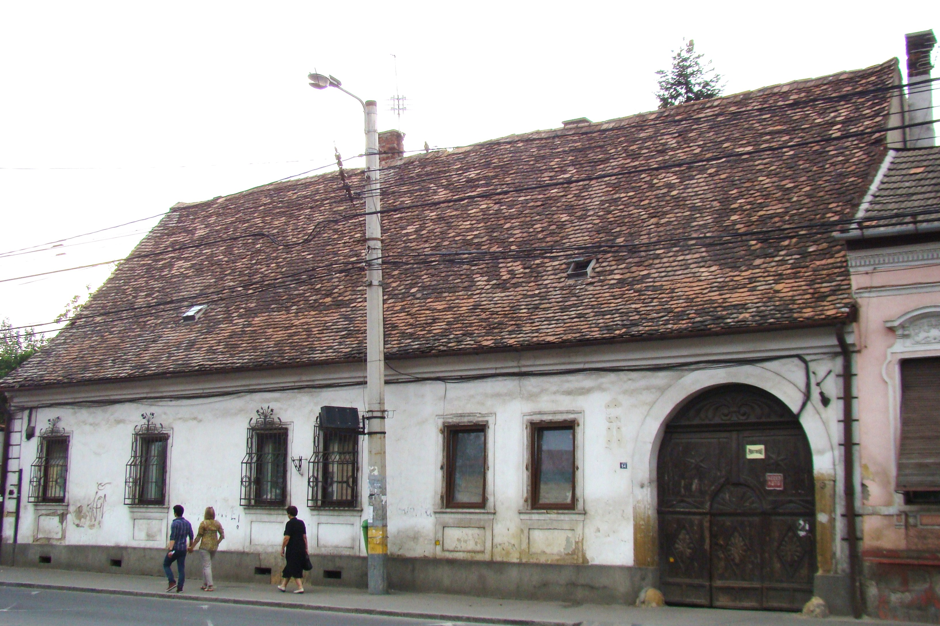 Clădire monument istoric, Calea Moților, nr. 54